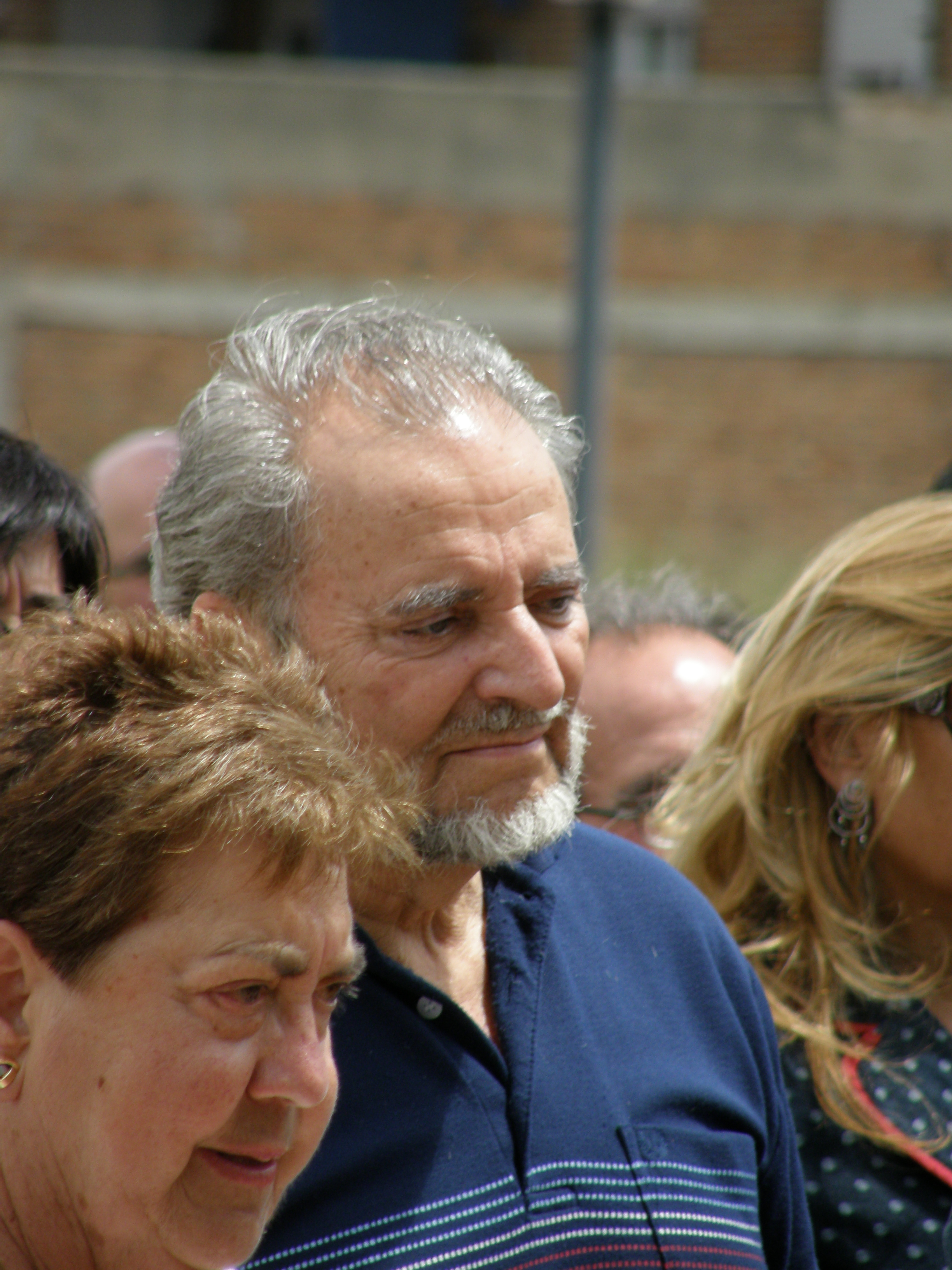 Julio Anguita durante un acto en Miranda de Ebro en 2009.